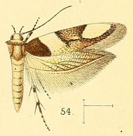 Alloclita gambiella